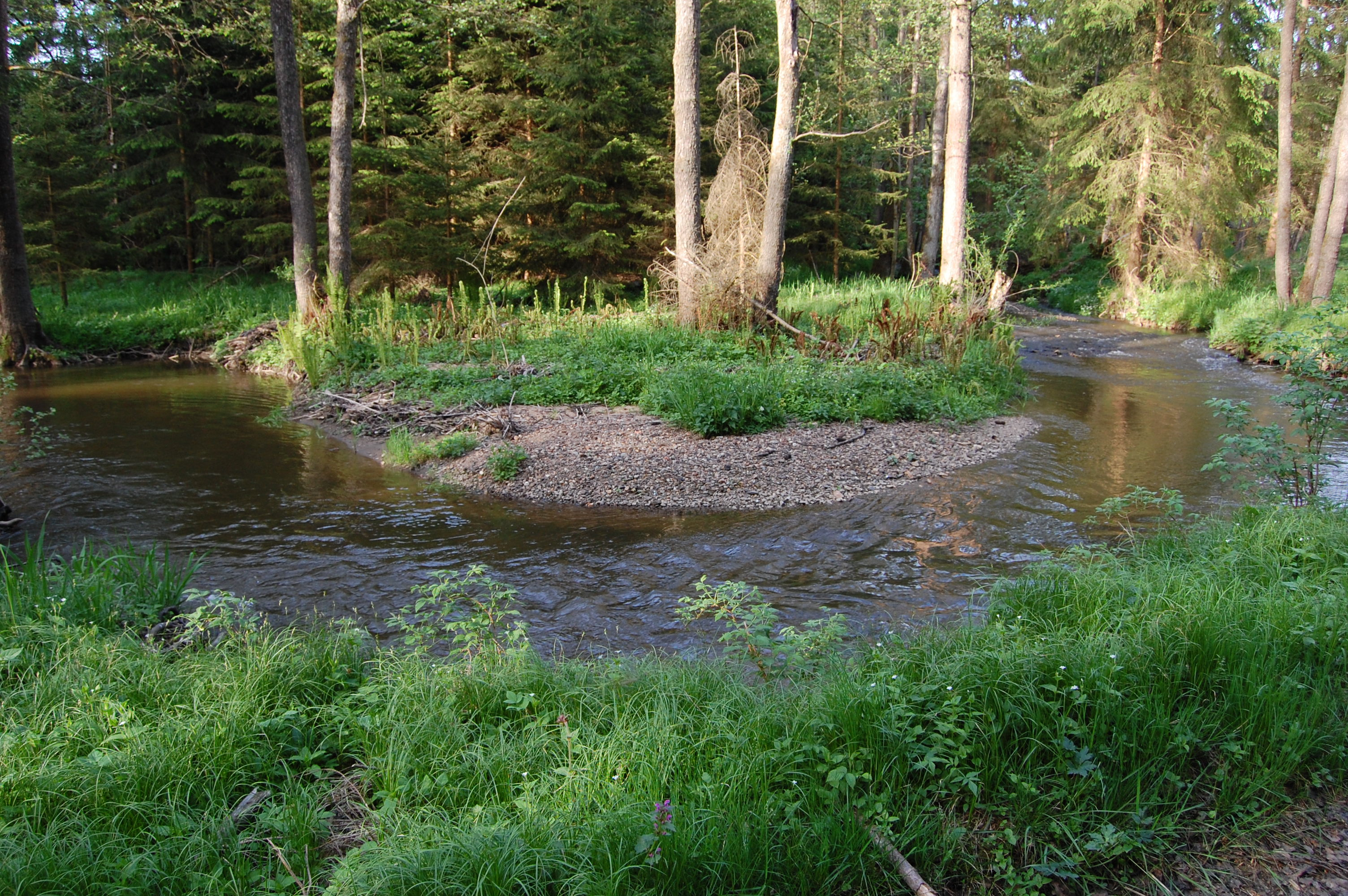 Murachschleife beim "Wutzelstein", Gemeinde Teunz, Landkreis Schwandorf, Oberpfalz, Bayern (2011) Der Name Teunz kommt von "tync", was soviel bedeutet wie "kleine Burg", oder von "tyn", der Bezeichnung für "Mauer, Zaun oder Umwallung" ( Schwarz, Ernst, Sprache und Siedlung in Nordortbayern, Nürnberg 1960, S. 217f.). Ob ein Zusammenhang zwischen einer Besiedlung durch die Slawen und den kaum mehr sichtbaren Überresten eines nordöstlich von Teunz gelegenen Burgstalls "in einer Schlinge der Murach auf dem Felsstock Wutzelstein" besteht (Mages, Emma, Oberviechtach, Historischer Atlas von Bayern, Teil Altbayern, Heft 61, München 1996, S. 9 und Stroh, Armin, Die vor- und frühgeschichtlichen Geländedenkmäler in der Oberpfalz (Materialhefte zur bayerischen Vorgeschichte, Reihe B, Bd. 3), Kallmünz 1975, Karte 8), ist nicht erwiesen.